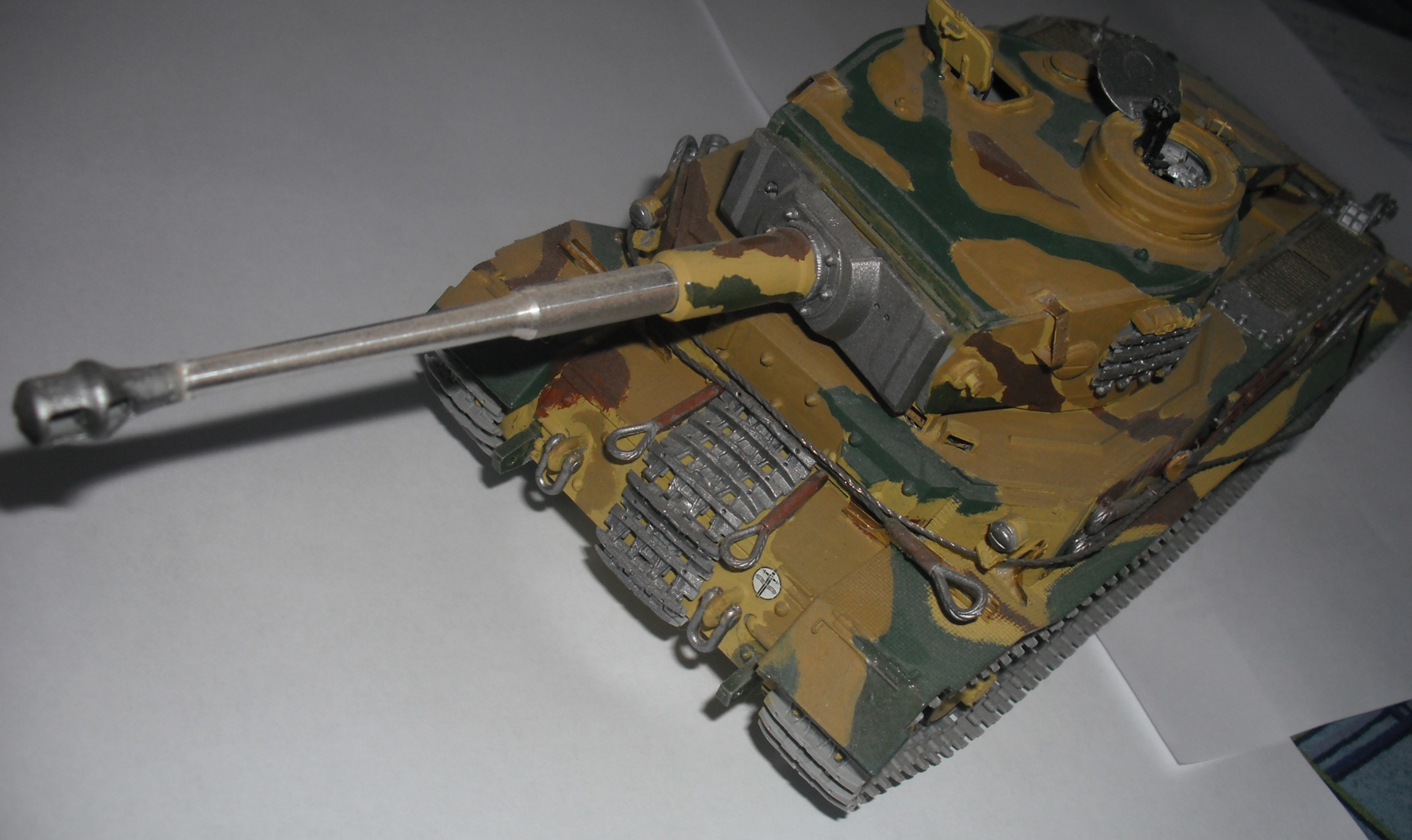 Porsche-Tigris (VK4501 P - Panzerkampfwagen VI Tiger P) modellje